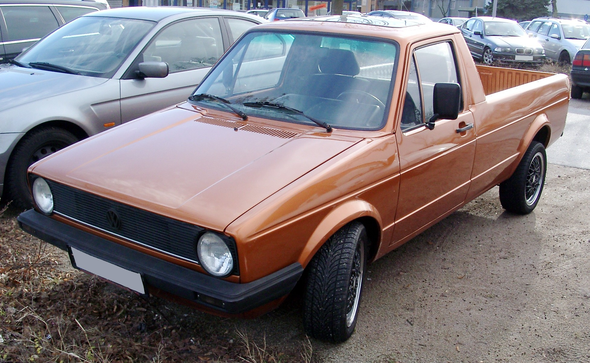 VW Caddy